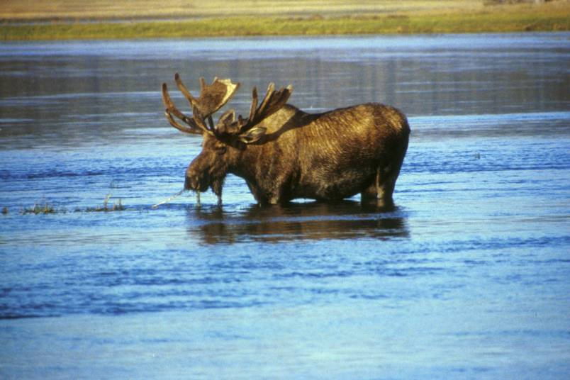 Moose in lake